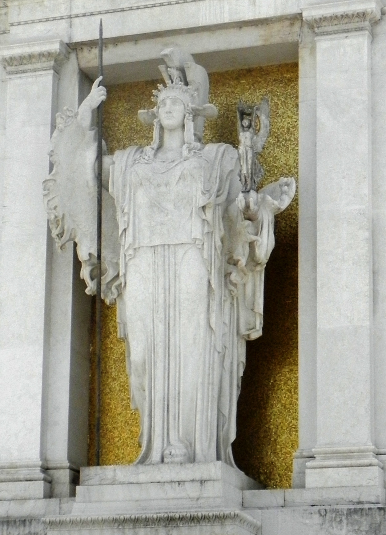 Статуя богині на площі Венеції и Римі